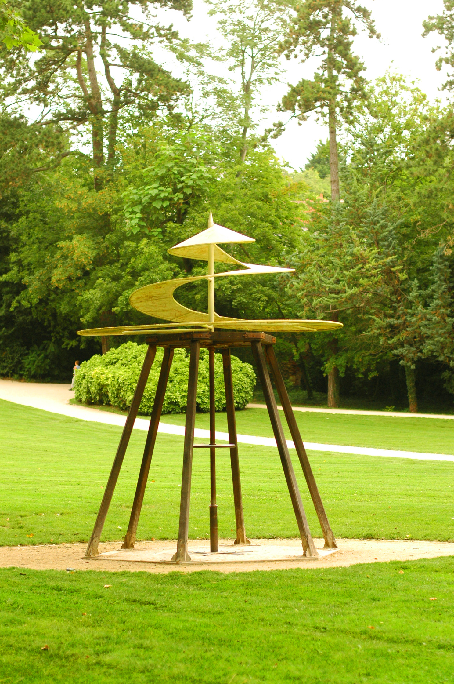 L'hélice